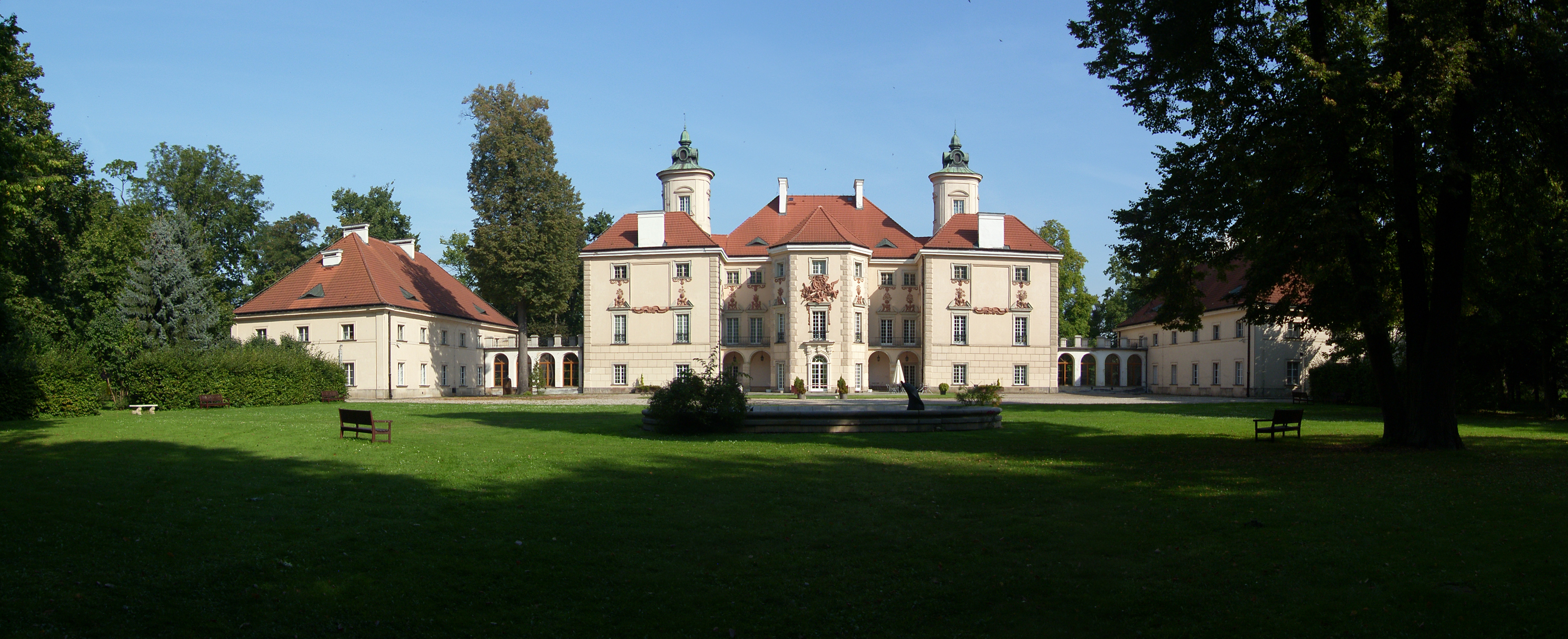 Pałac w Otwocku Wielkim w gminie Karczew, jest dawną siedzibą rodu Bielińskich, którzy pozostawali w ścisłych związkach z dworem Sasów, co zapewniało im kariery polityczne i intratne stanowiska.